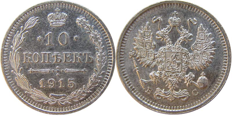 10 копеек Николая II 1915, серебро. Original uploader was User:Vizu in ru-wikipedia